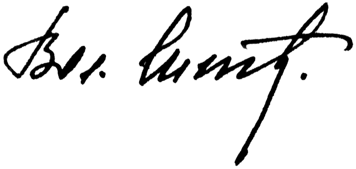 Роспись главы Администрации Президента Украины Владимира Литвина